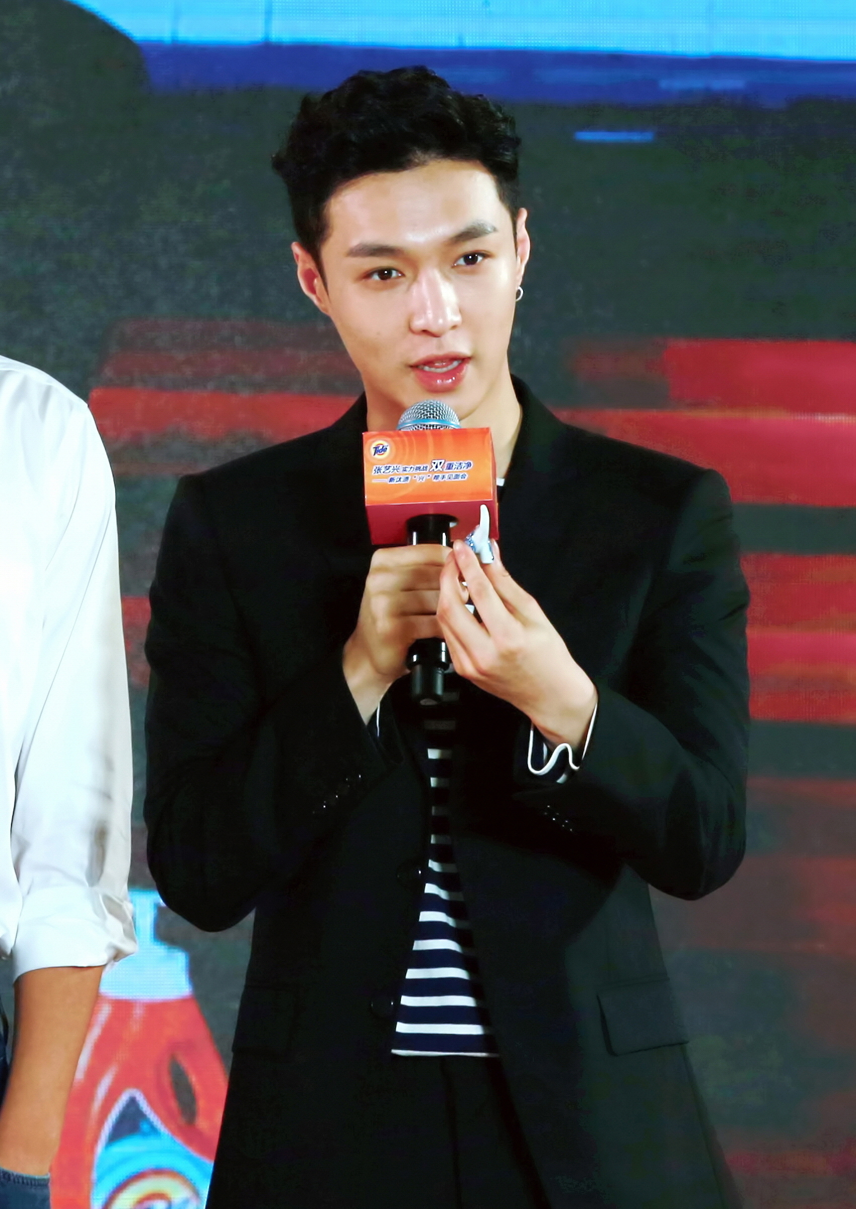 愚人节快乐啊各位 我决定在愚人节做一个正经人